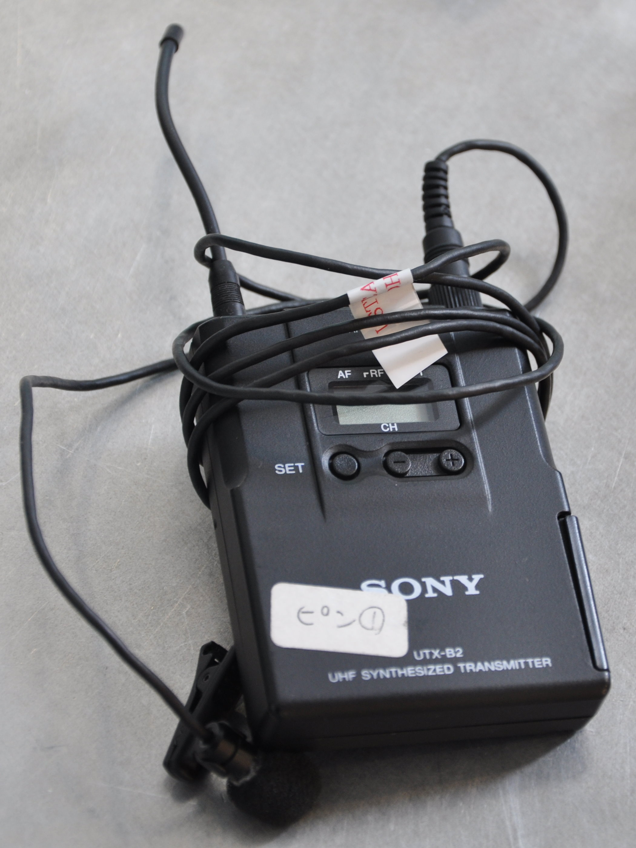 Sony無線電麥克風發送器UTX-B2。